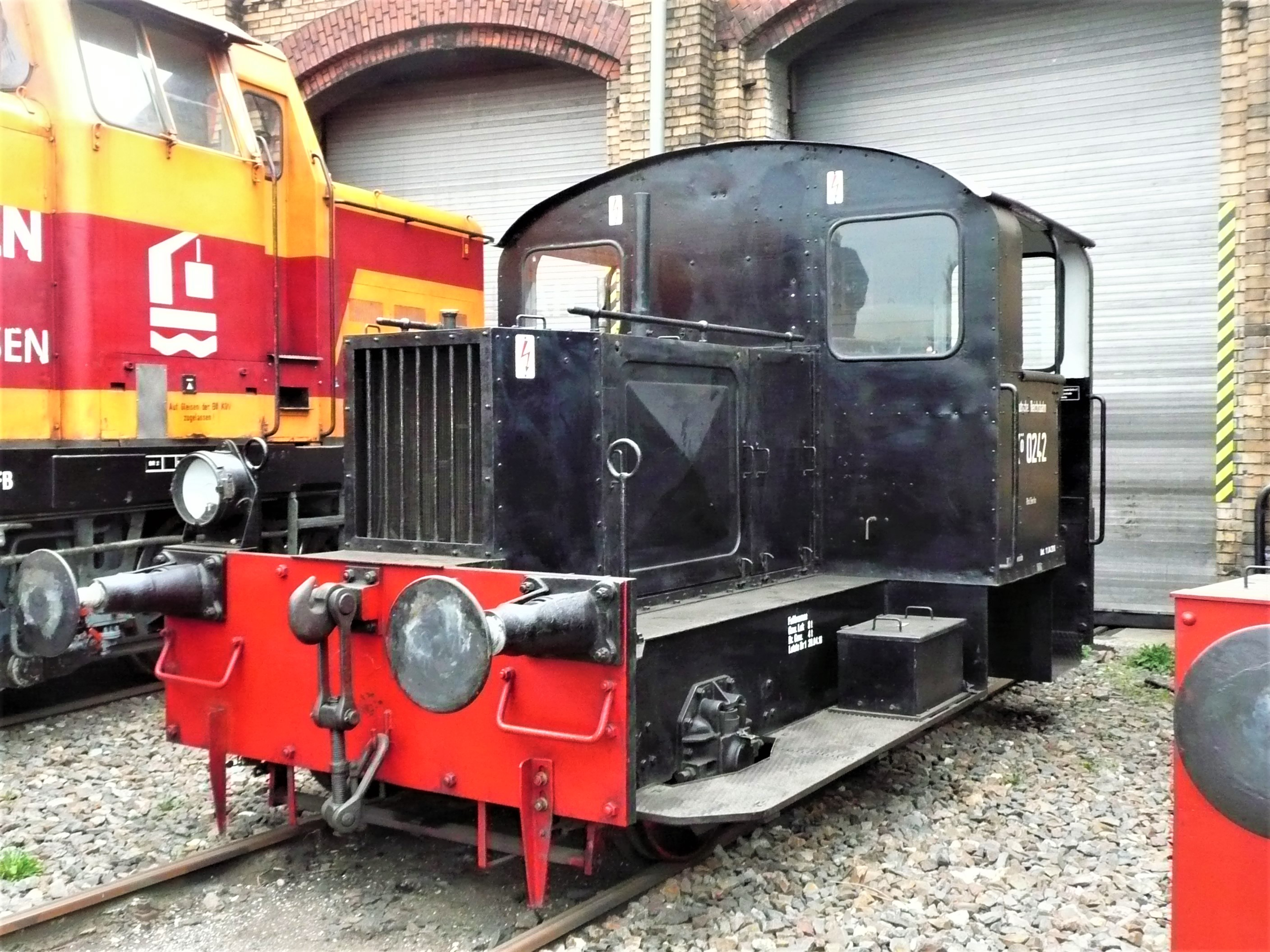 Kö Lk 1 NR. 0242 im Depot Berlin-Schöneweide